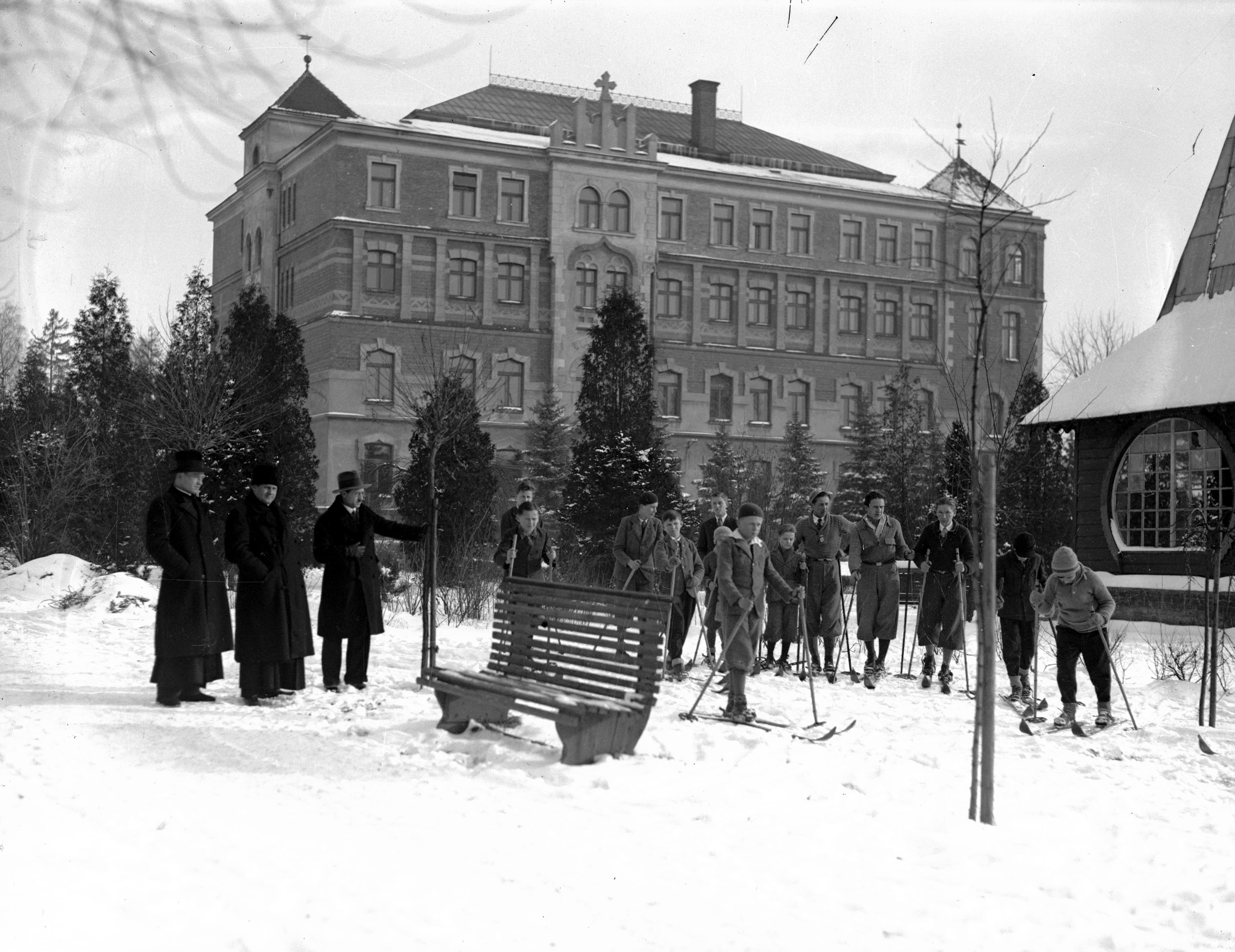 Nauczyciele i grupa uczniów na nartach przed budynkiem Gimnazjum im. Stanisława Konarskiego w Rakowicach.